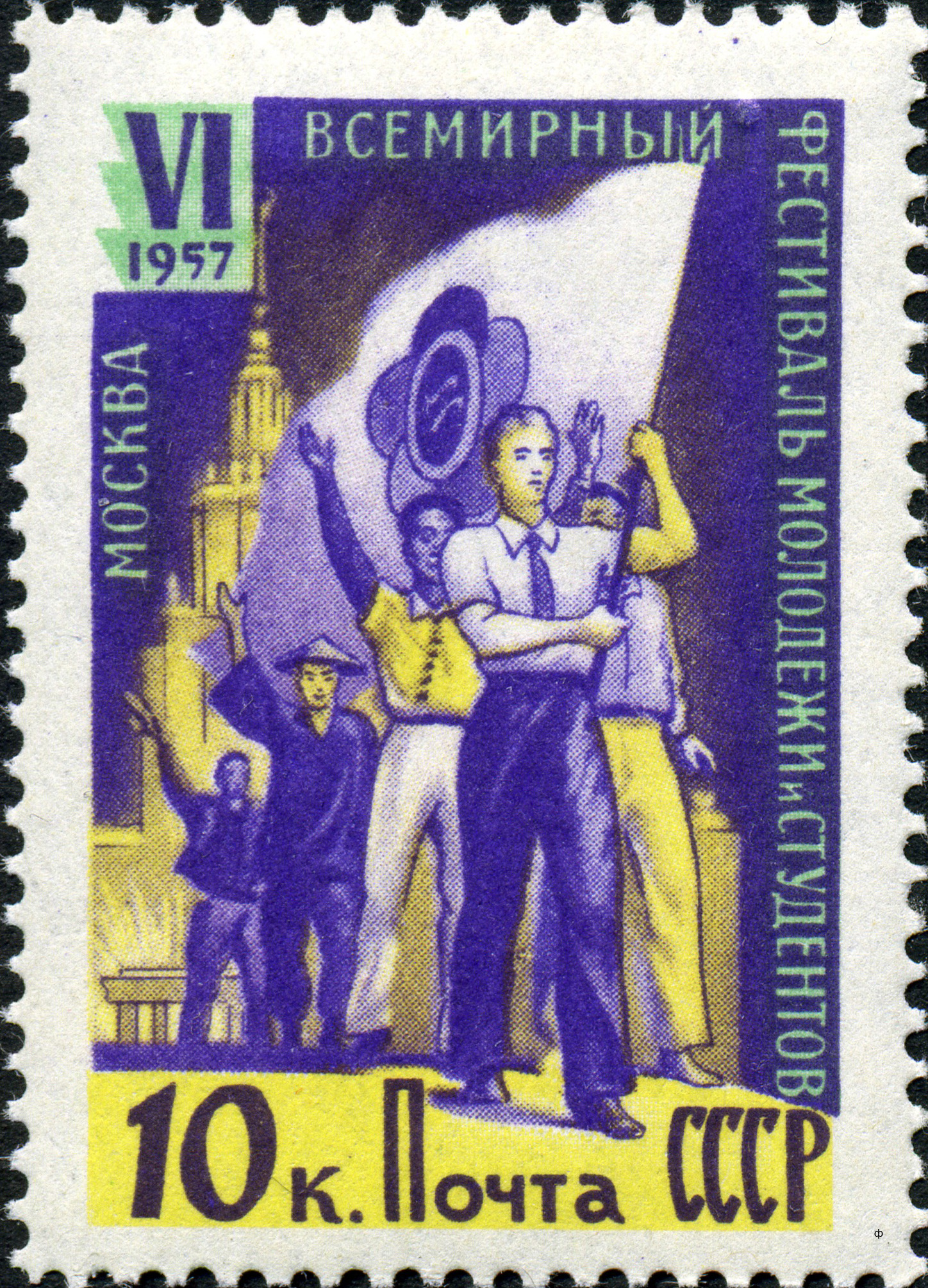 Марка СССР